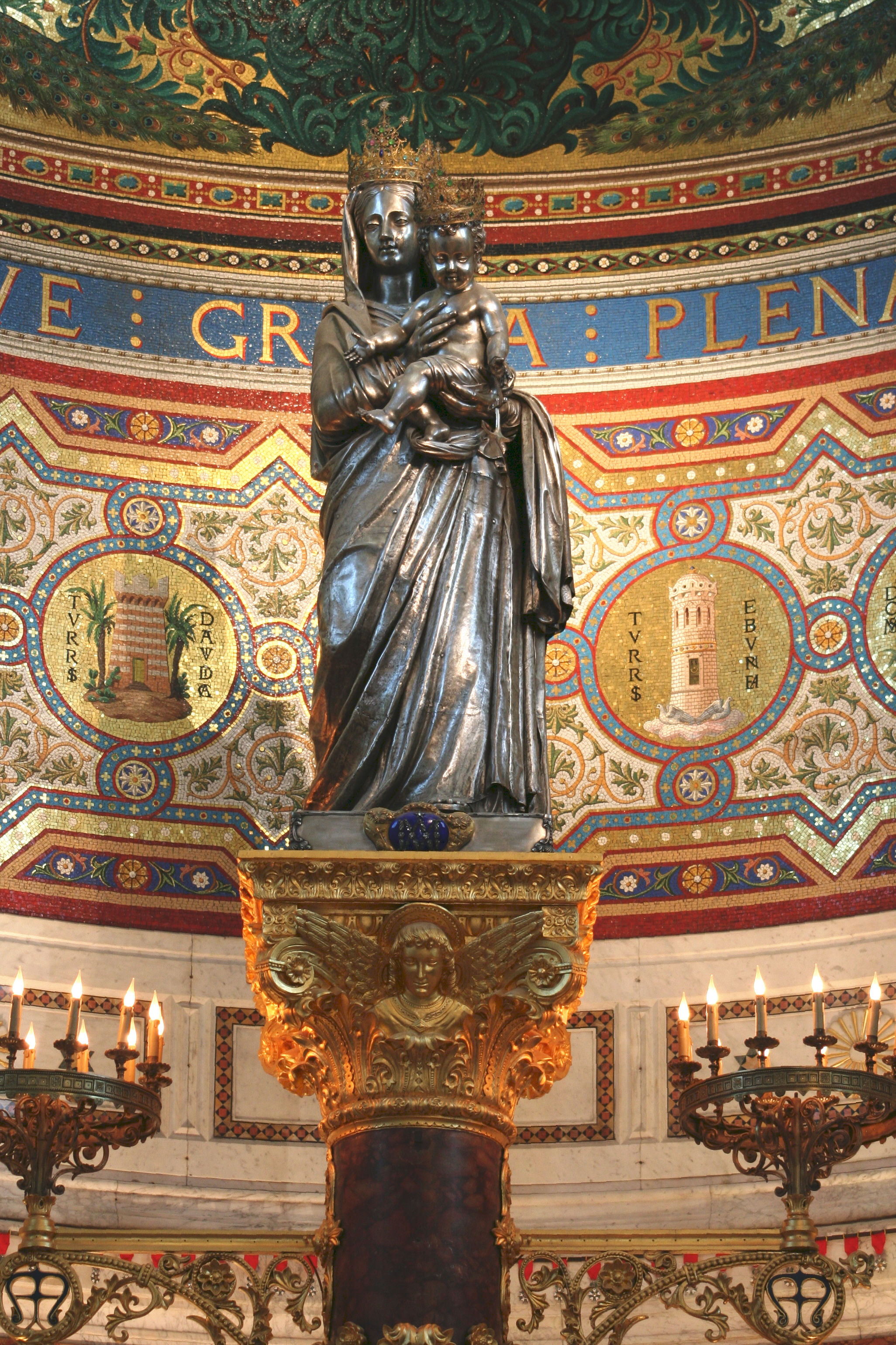 Statue en argent repoussé au marteau de la Vierge située dans l'église supérieure de la Basilique Notre-Dame de la Garde à Marseille. Statue du XIX° siècle.